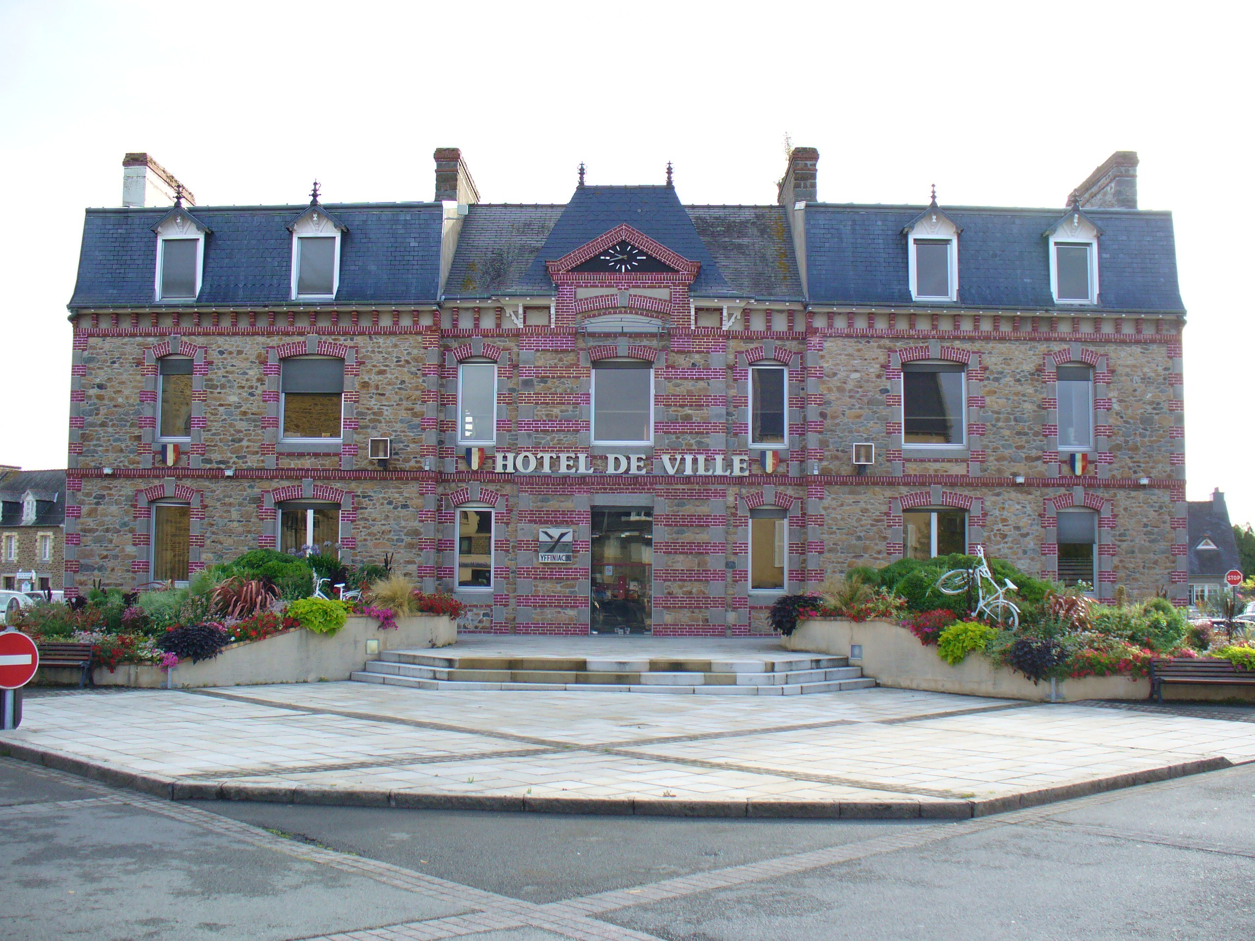 Mairie d'Yffiniac